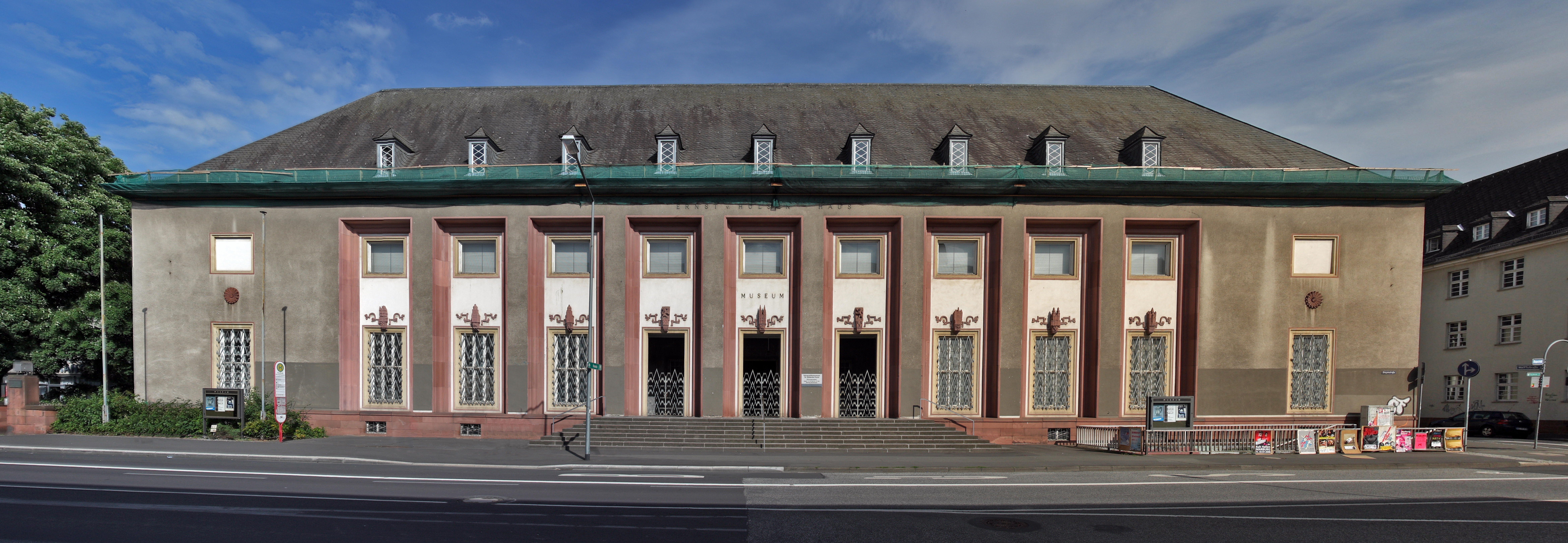 Das Marburger Universitätsmuseum für Bildende Kunst im Ernst-von-Hülsen-Haus